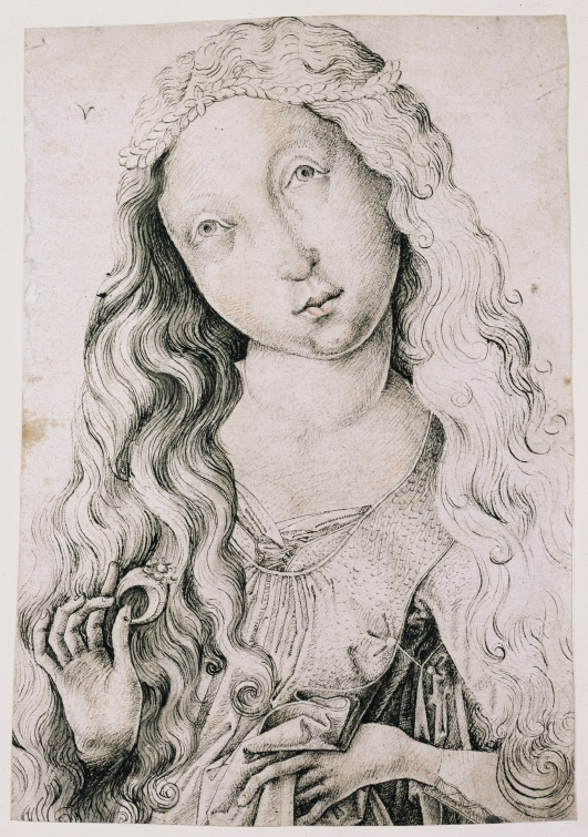 Portrait d'une jeune fille en buste (peut-etre sainte Catherine)